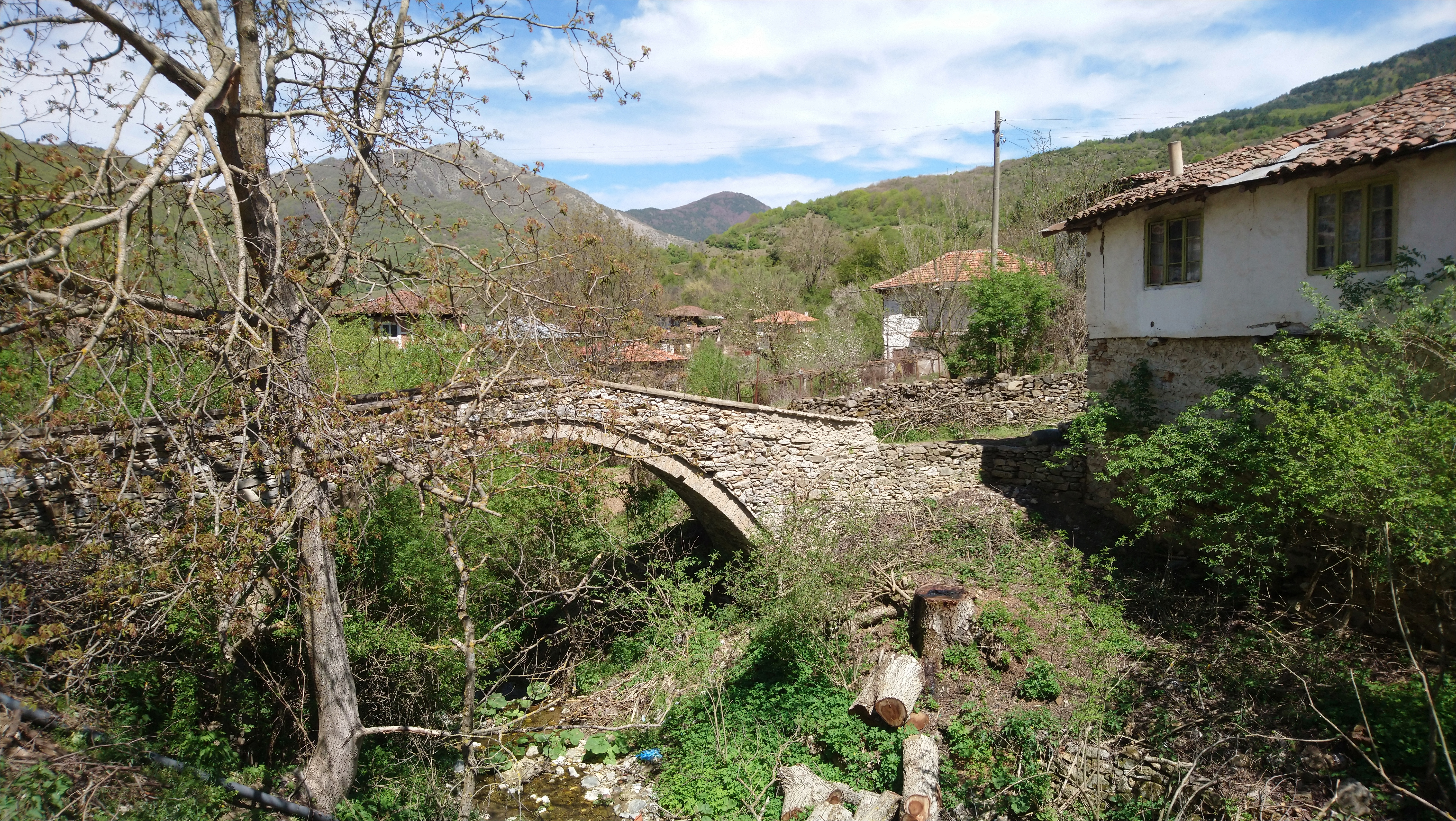 Каменният мост в село Голешово